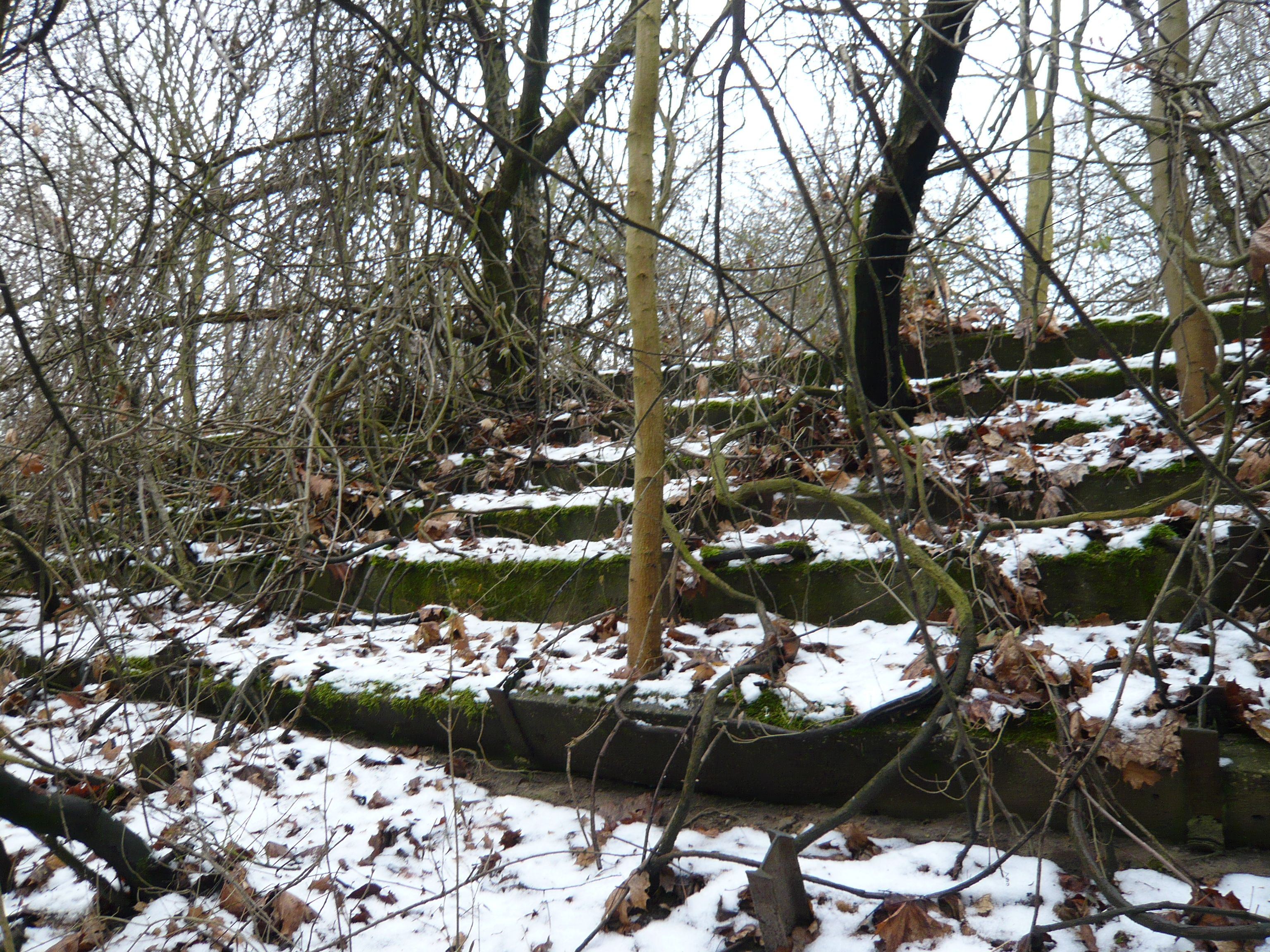 altes Lichtenberger Stadion, östliche Tribüne der 1950er Jahre